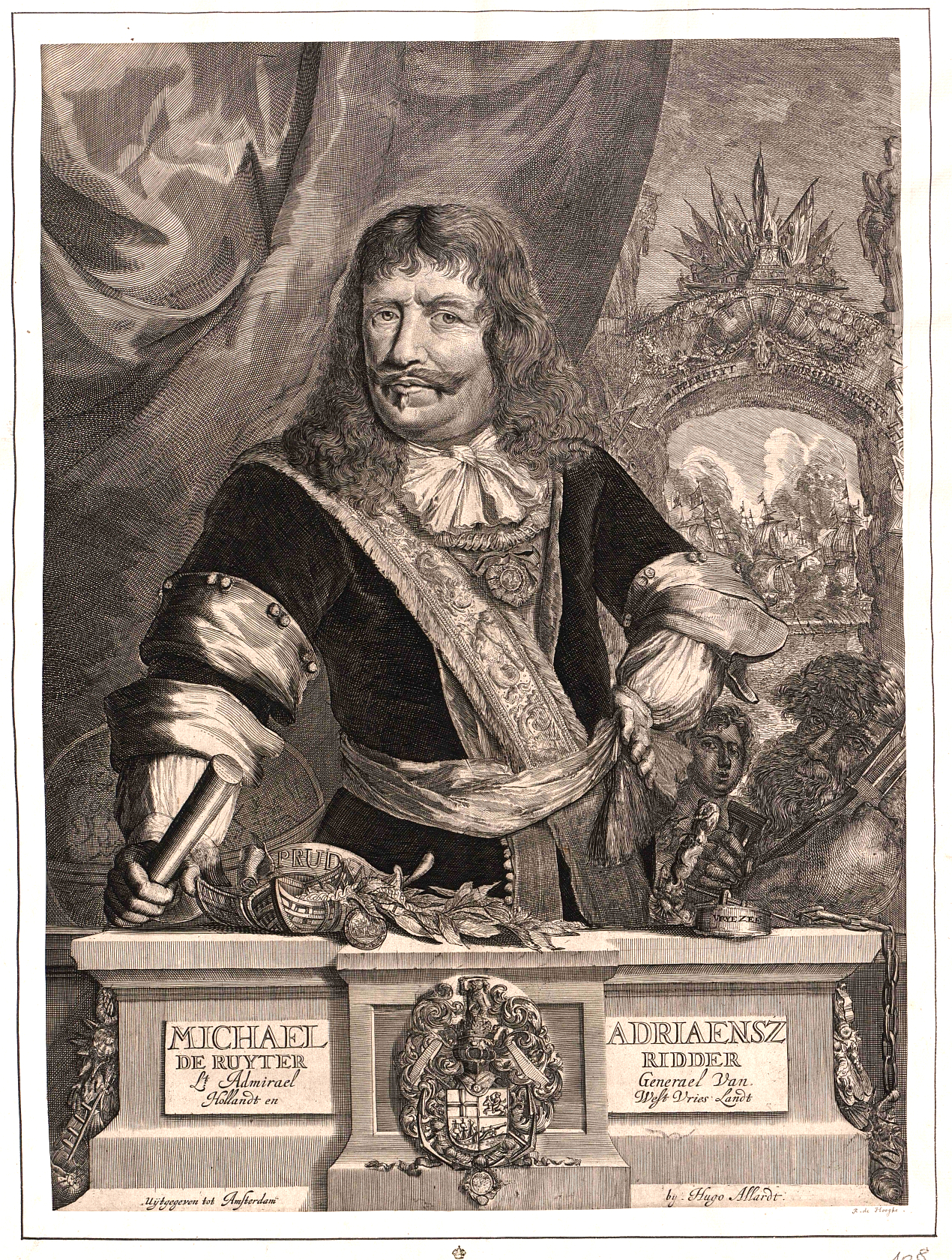 Ruyter, Michiel Adriaansz de